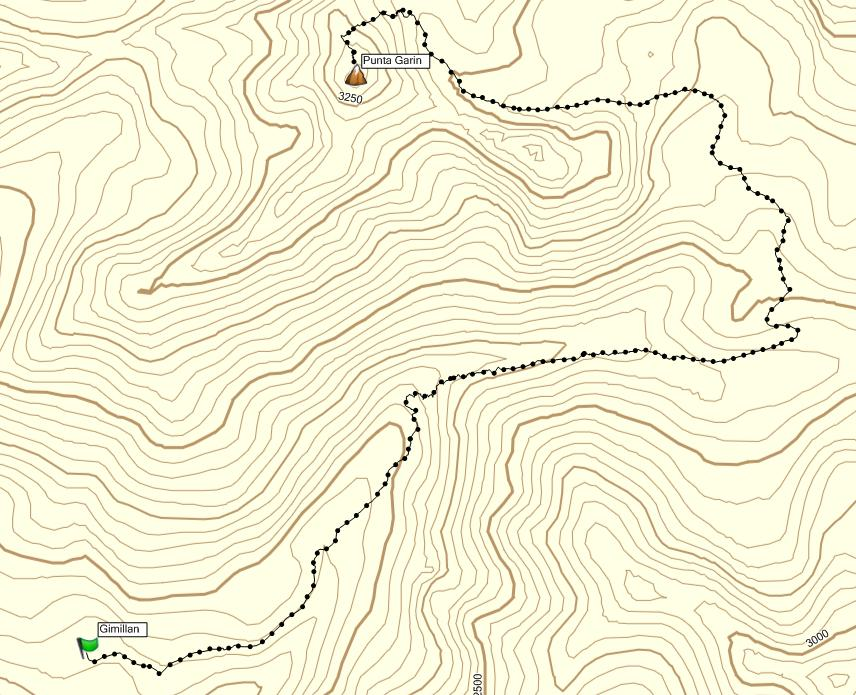 Visualizzazione grafica della salita alla Punta Garin per il Vallone di Grauson - Alpi Graie - Valle d'Aosta - Italia